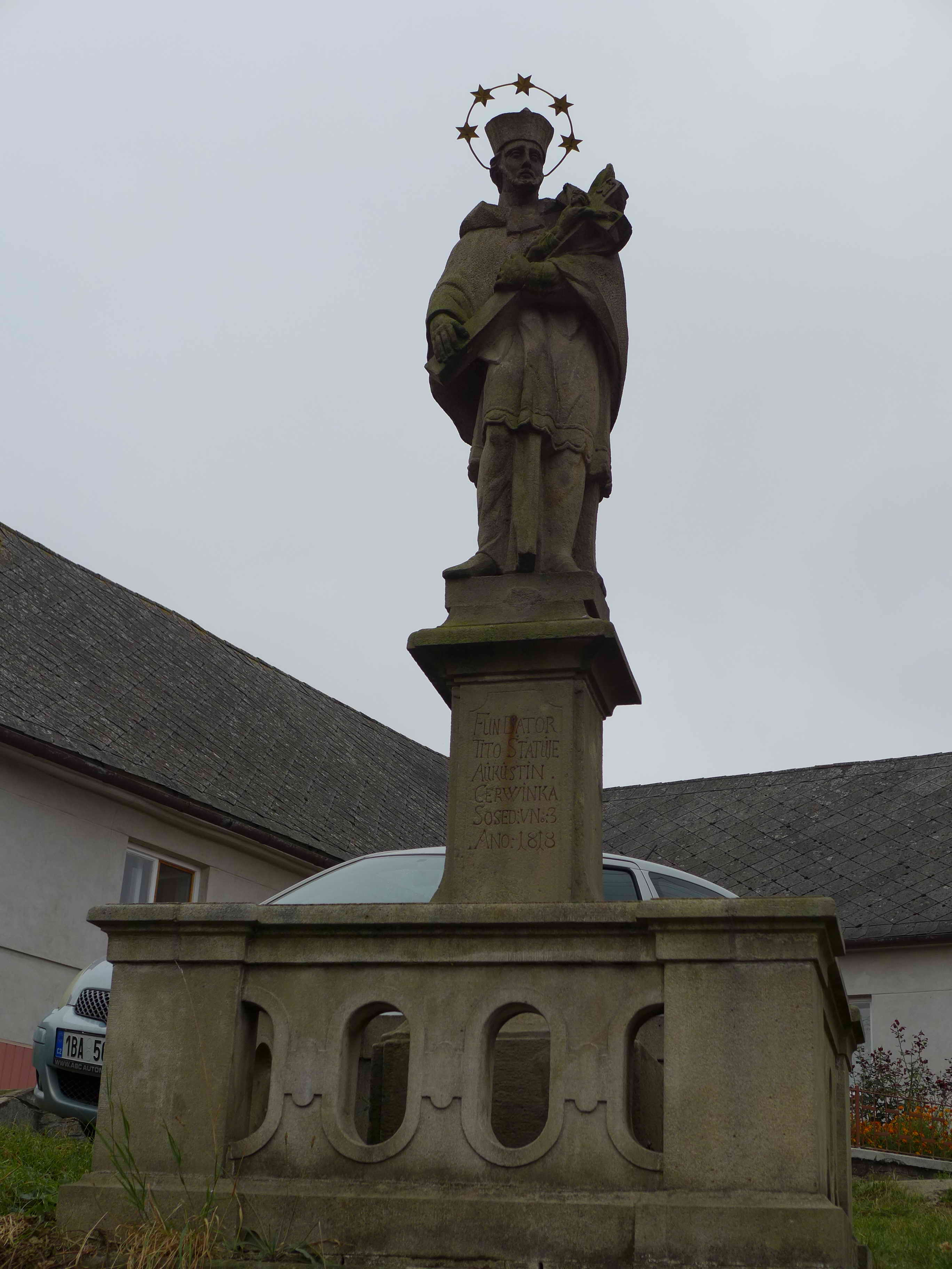 Socha svatého Jana Nepomuckého, náves, Padochov, Padochov.